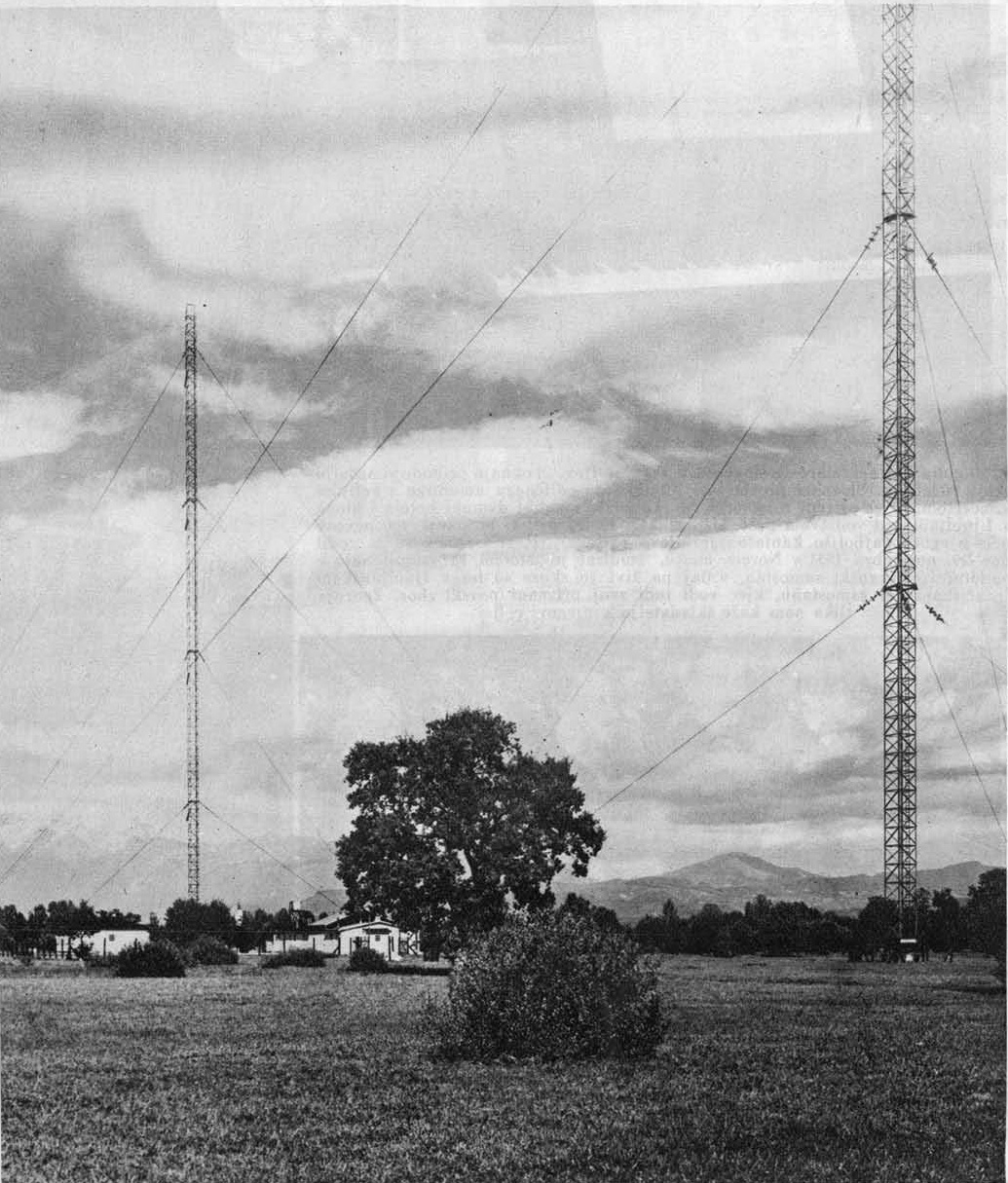 Pogled na celotno radio-oddajno postajo v Domžalah.